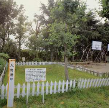 入野遺跡のうち保存されている住居跡